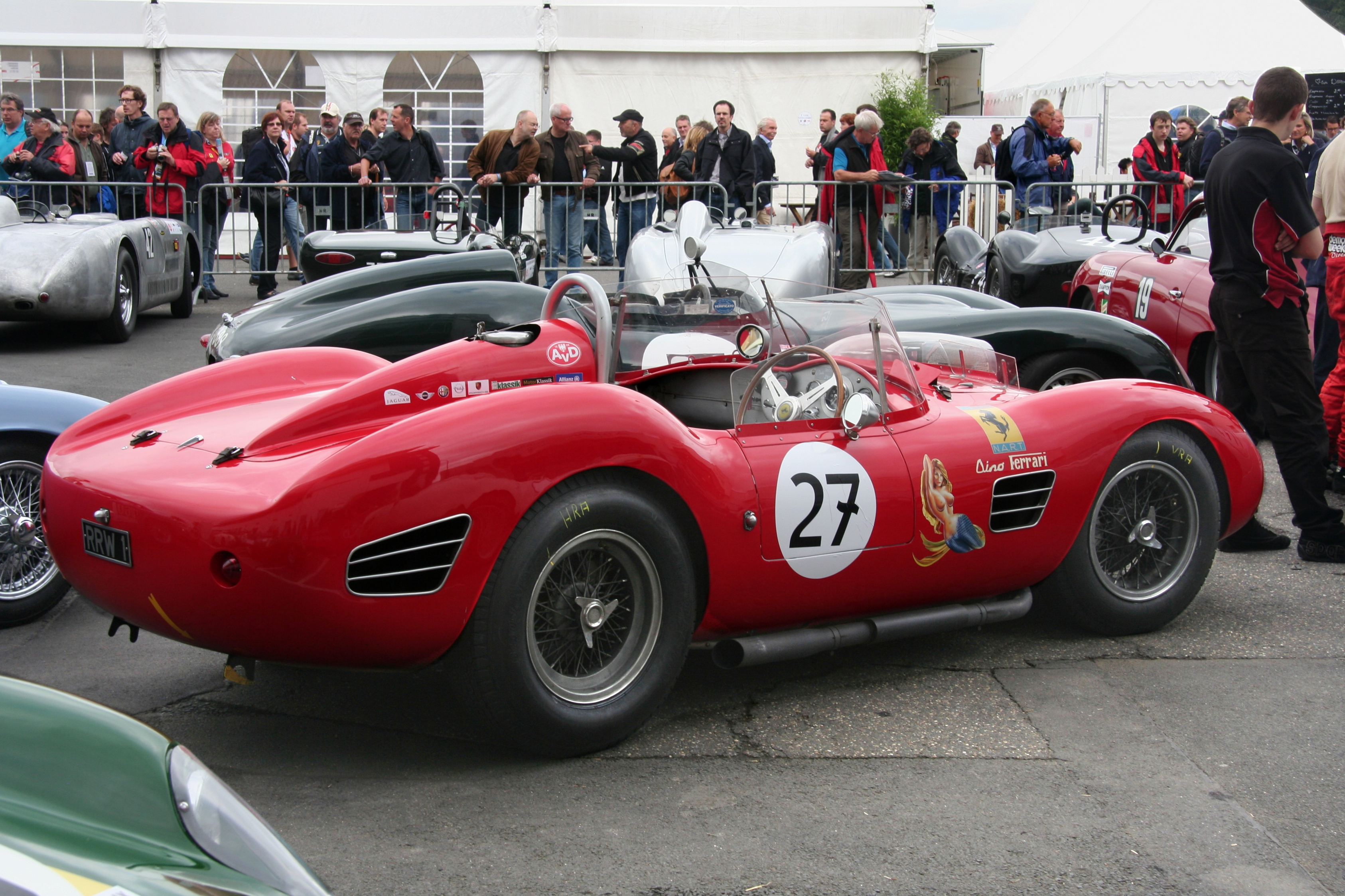 Ferrari Dino 196 S, Baujahr 1959, mit V-6-Frontmotor, 2 Liter Hubraum, beim Oldtimer-Grand-Prix des AvD 2011 im Fahrerlager des Nürburgrings